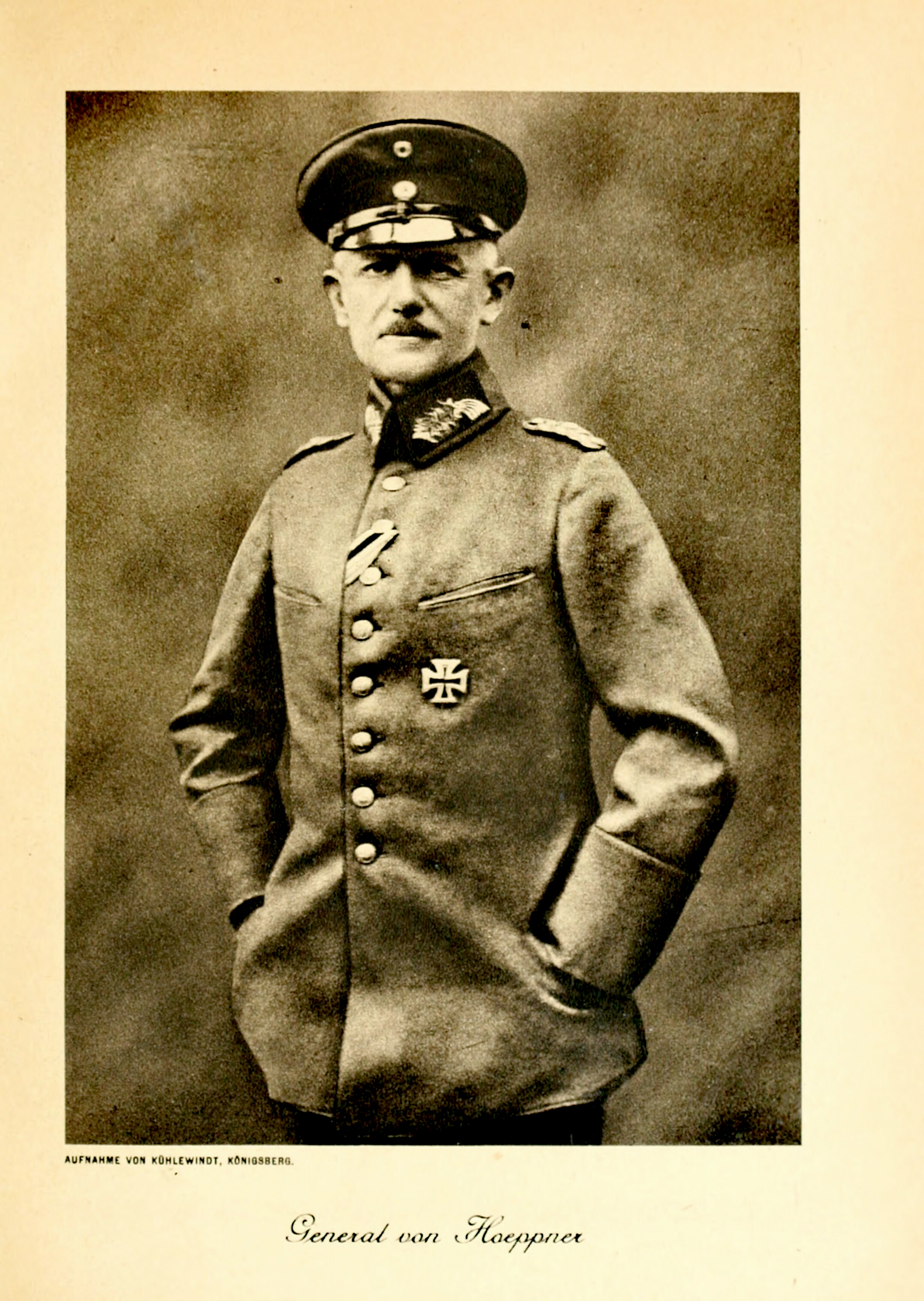 General von Hoeppner